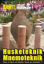 BioNyt - Videnskabens Verden. Temanummer om husketeknik. Se og